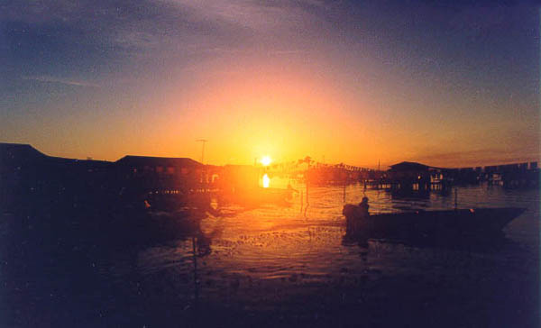 atardecer en el congo mirador